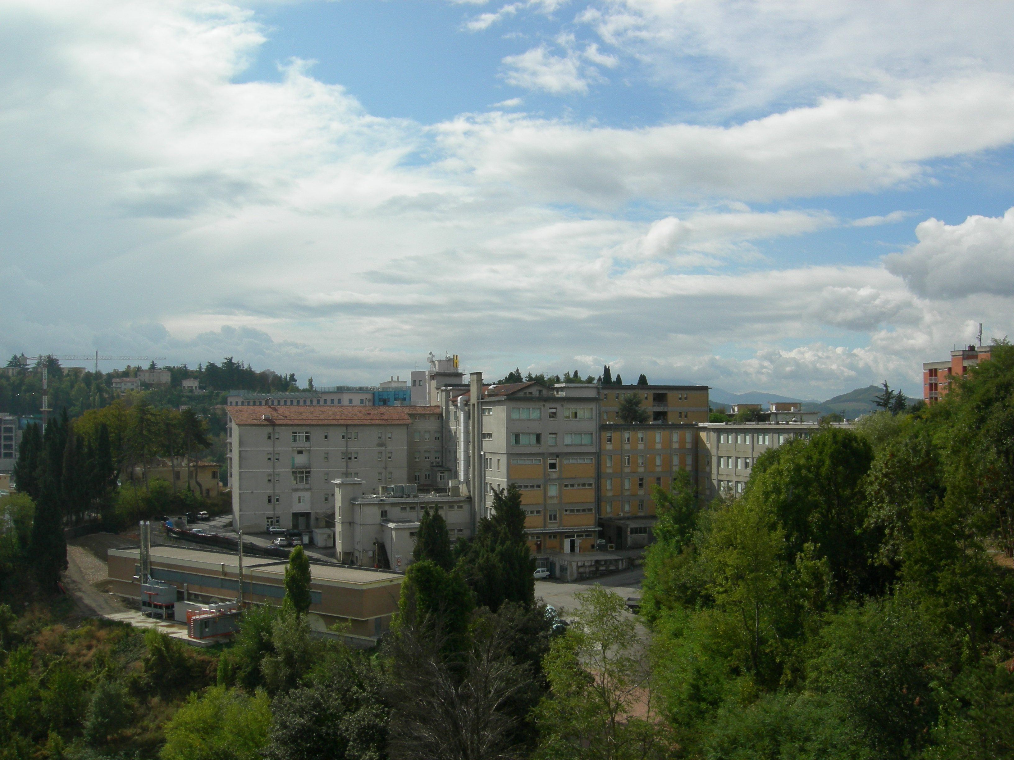 Veduta esterna dell'Ospedale di Urbino.